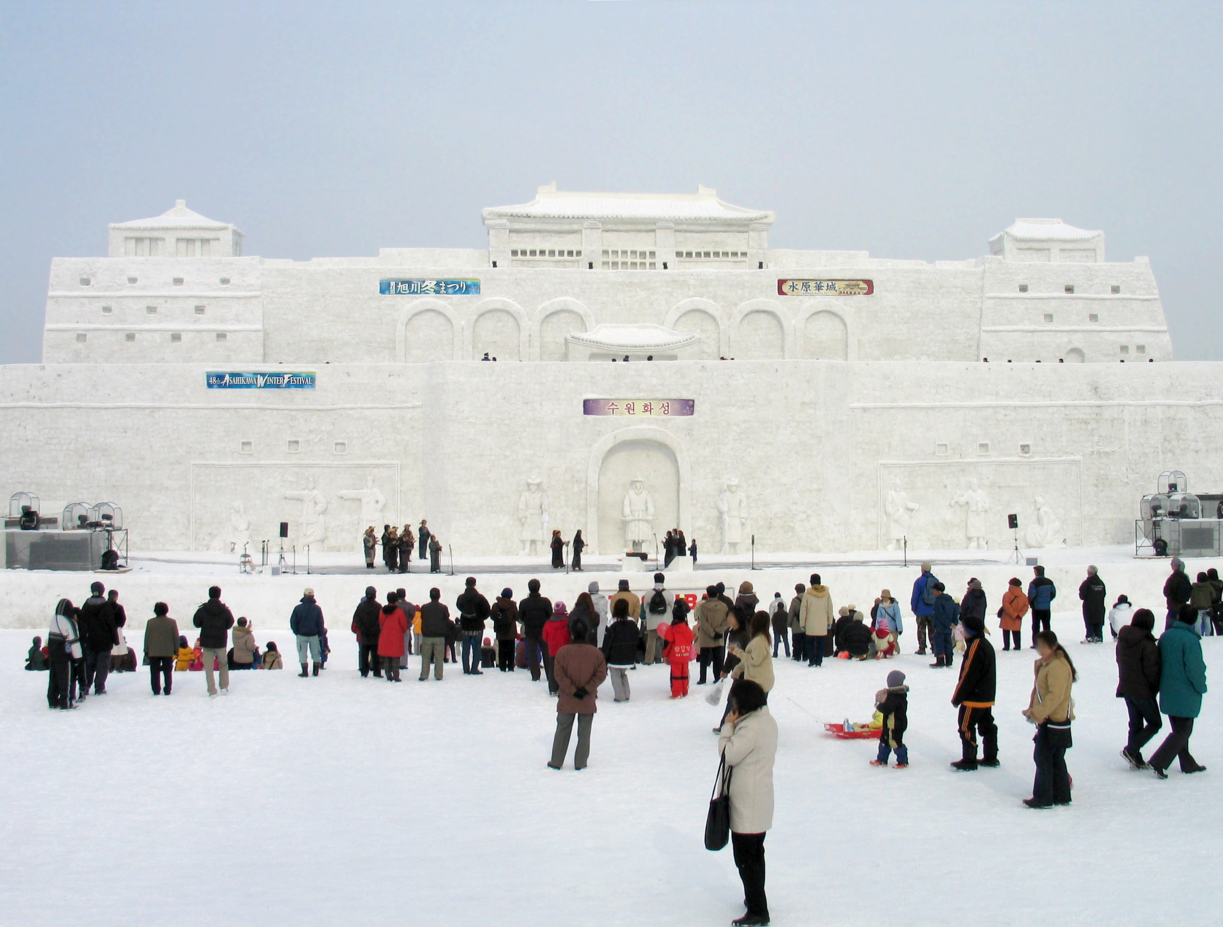 旭川冬まつりのメイン雪像「水原華城（スウォン・ファソン）」（北海道旭川市）